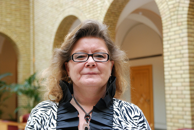 Wenche Olsen